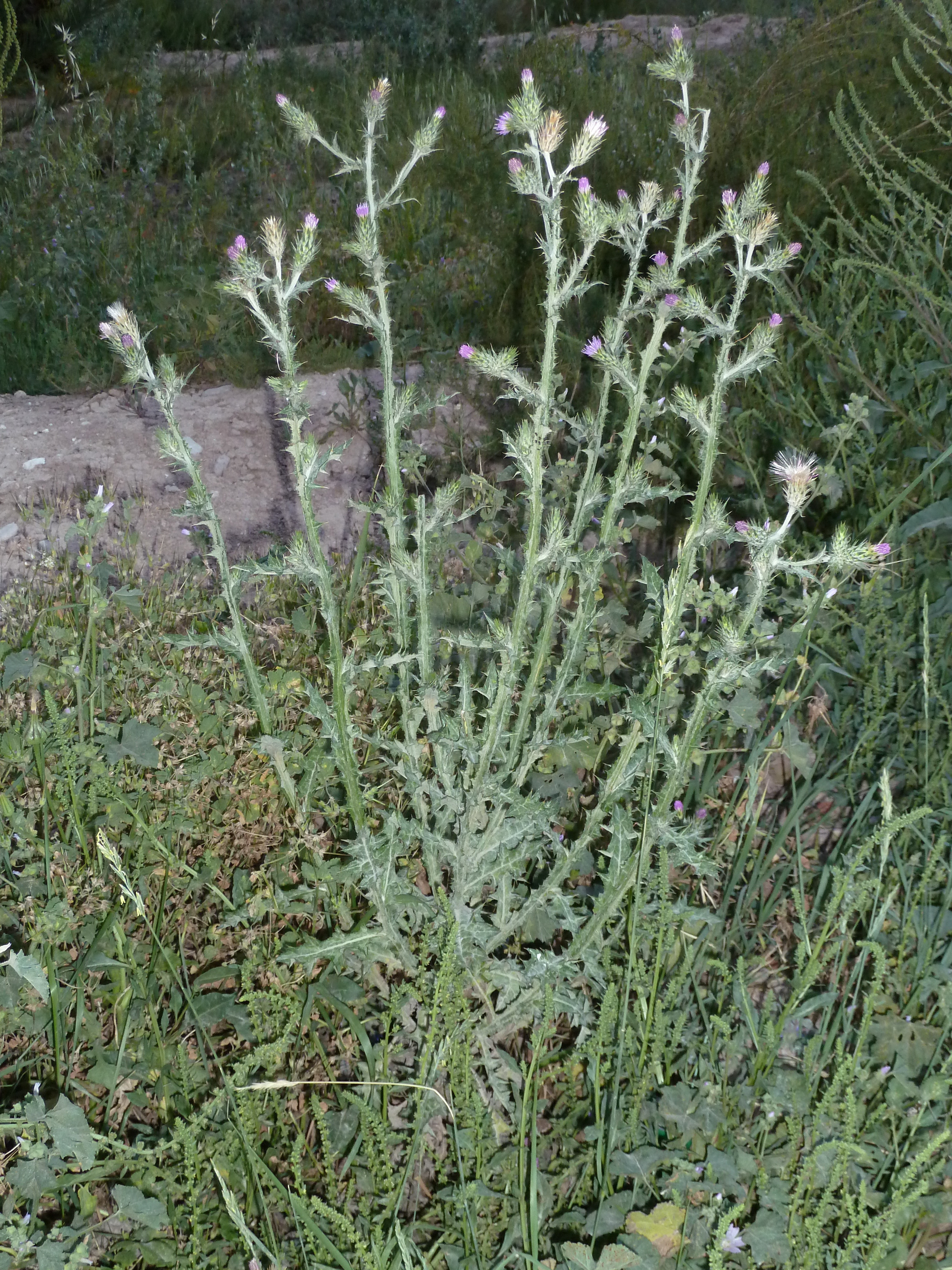 Carduus pycnocephalus (cardo, cardo borriquero, cardo negro) - Vista general en antesis. - Descampado circa Biblioteca, Albatera (Ptovincia de Alicante, España).